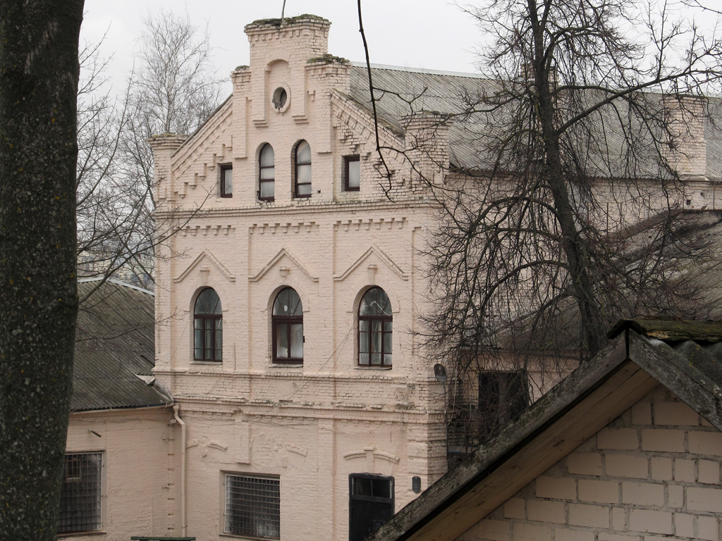 Мінск. Вінакурня Любанскіх (Вуліца Маякоўскага, 79А)